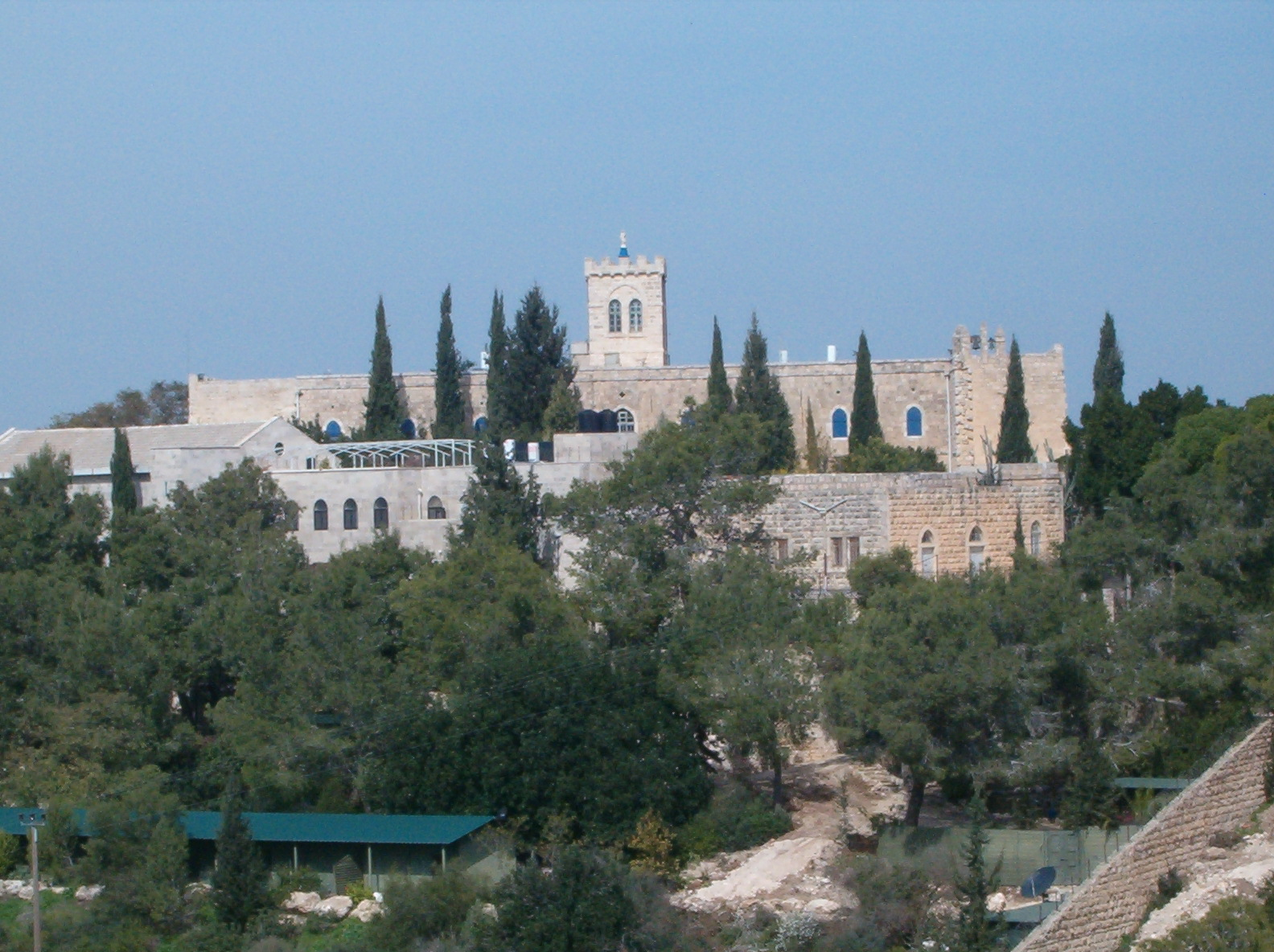 מנזר בית ג'מל, מראה כללי. Bet Gemal monastery in Israel